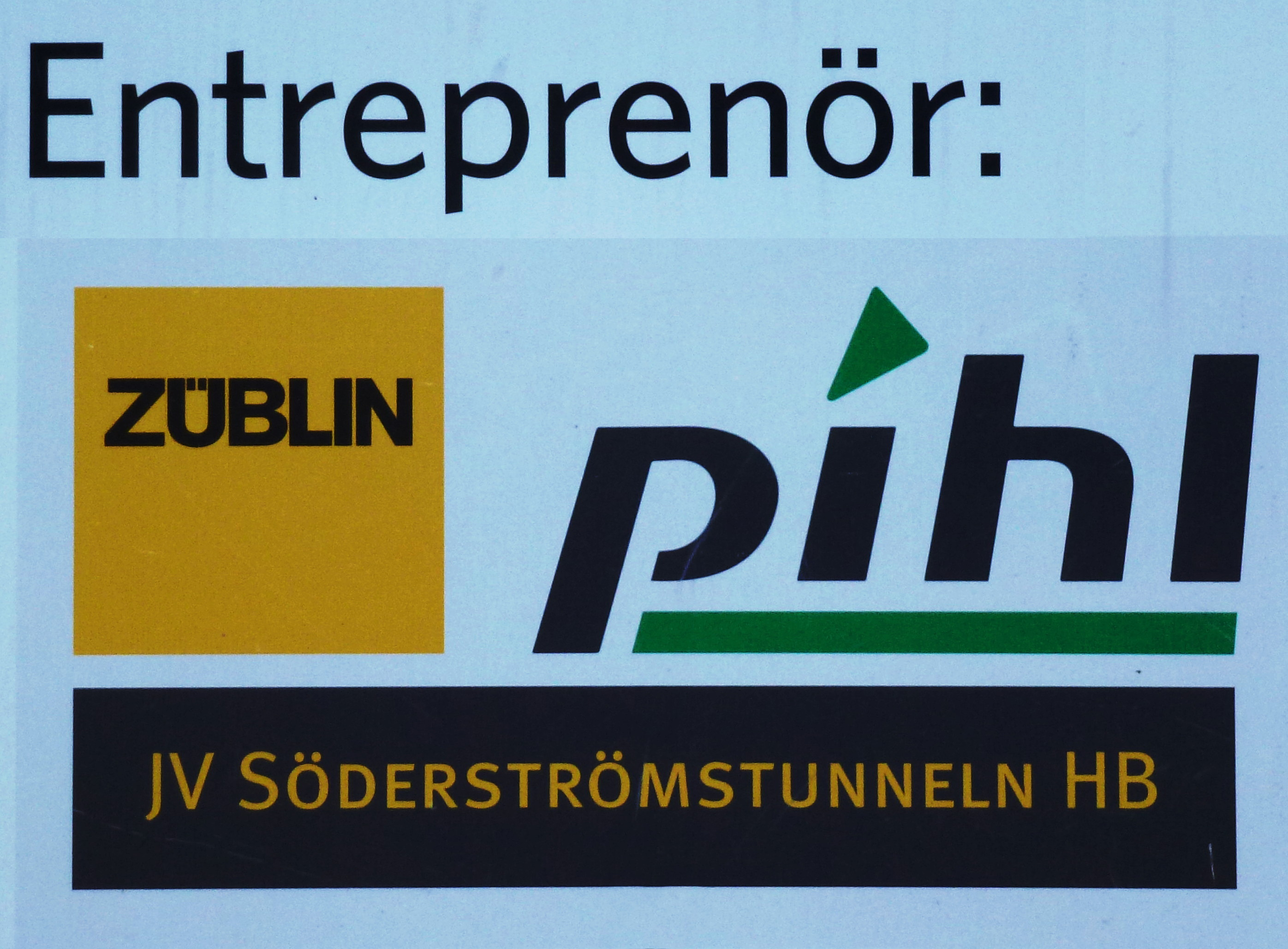 Züblins och Pihls skylt vid Citybanan